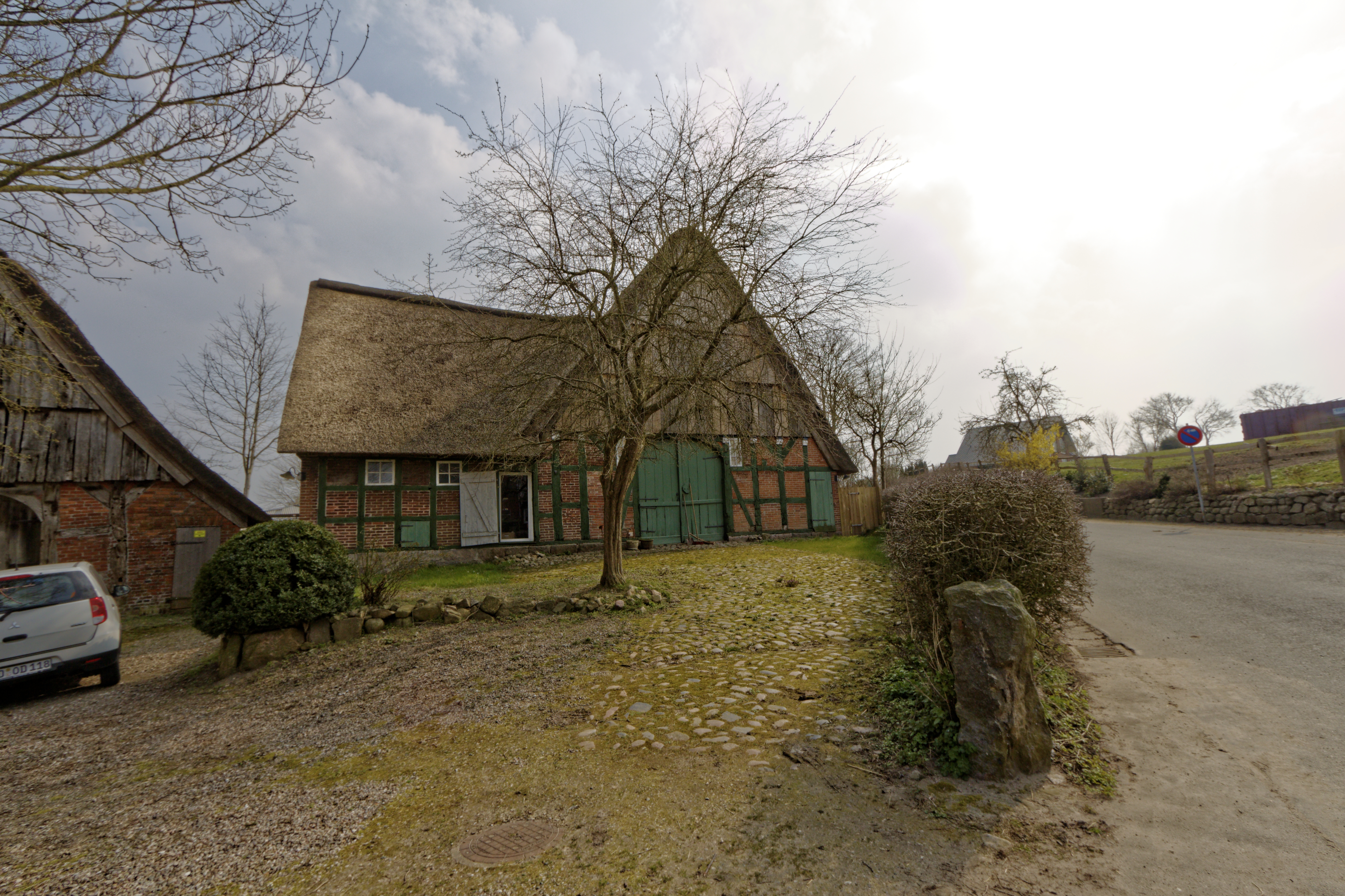 Bissee, Bothkamper Weg 2; Fachhallenhaus